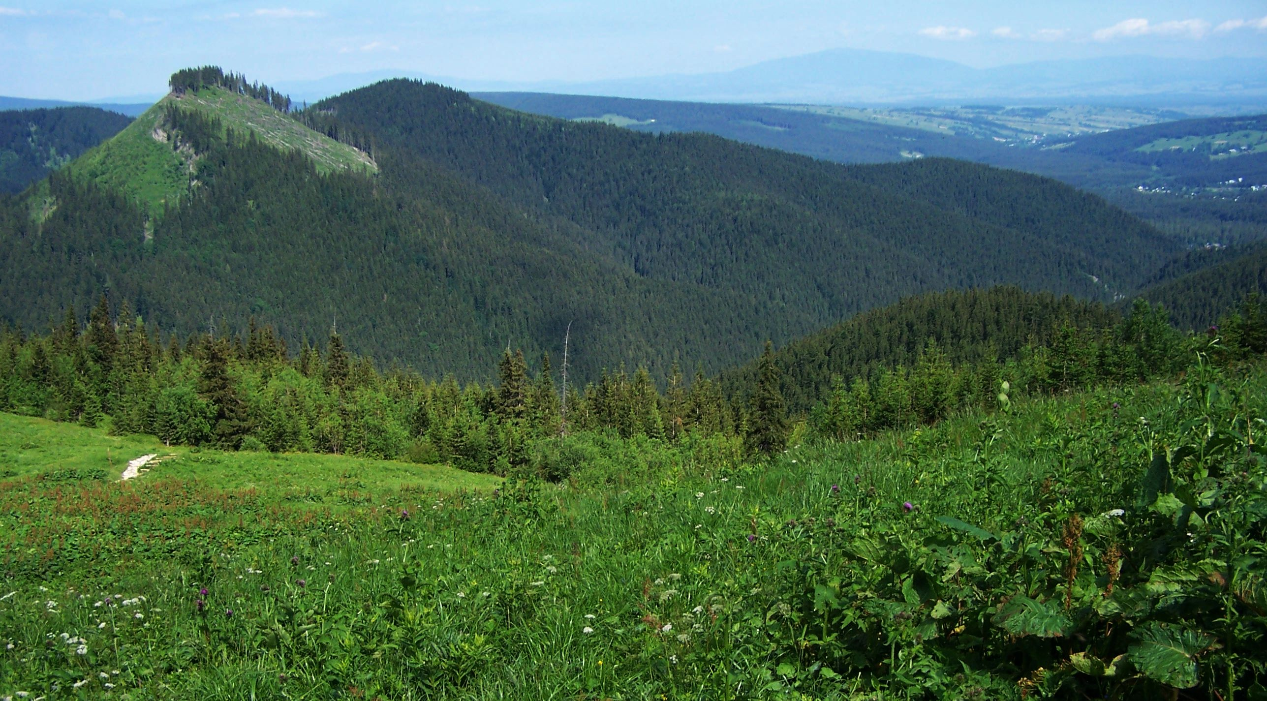 Kościeliskie Kopki (West Tatra Mountains). View from Polana Upłaz.